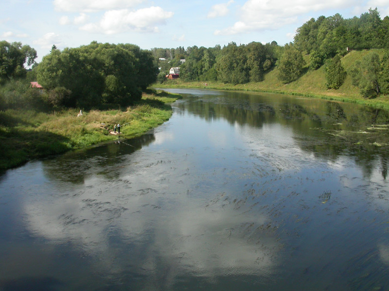 Der Fluss Rusa in der Gegend der gleichnamigen russischen Stadt